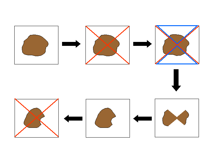 Česky: Schéma kvartace.